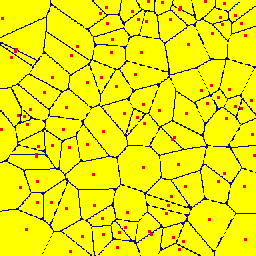 Partition de Voronoï (frontière bleue) avec 100 germes poissoniens (rouge)